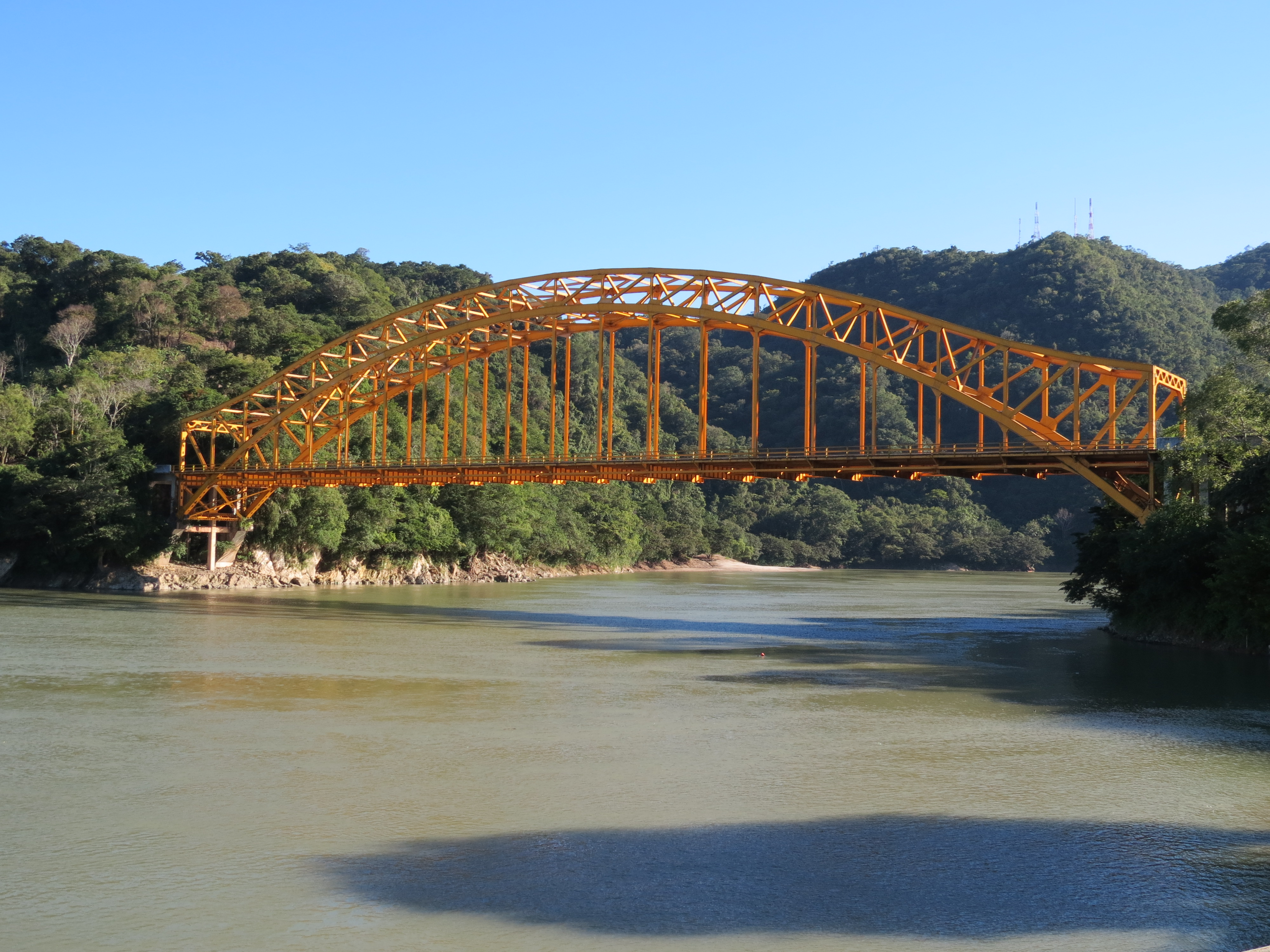 Puente "Boca del Cerro", municipio de Tenosique, Tabasco, México.